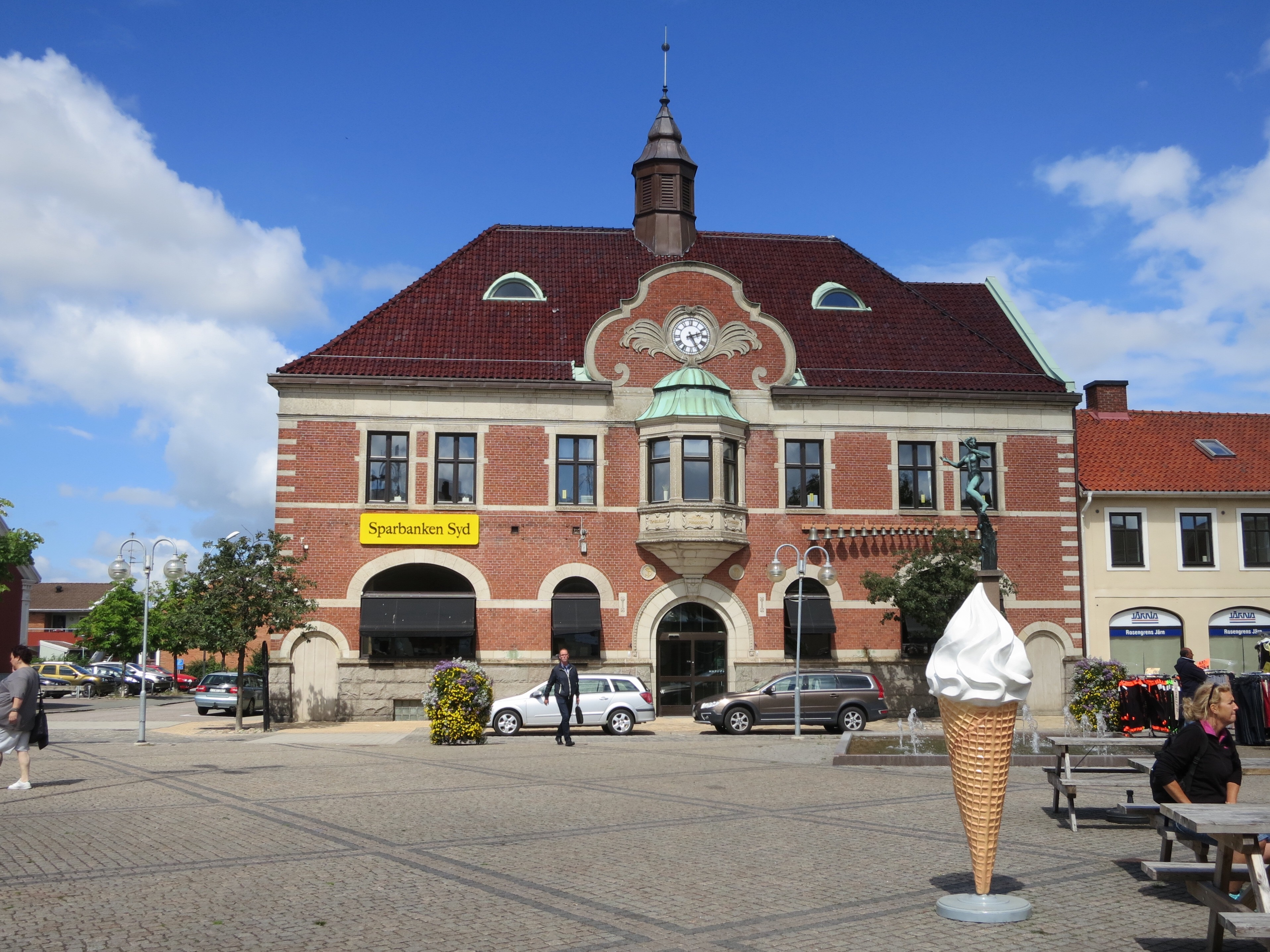 Tomelilla Sparbank 2016